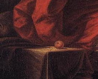 detail